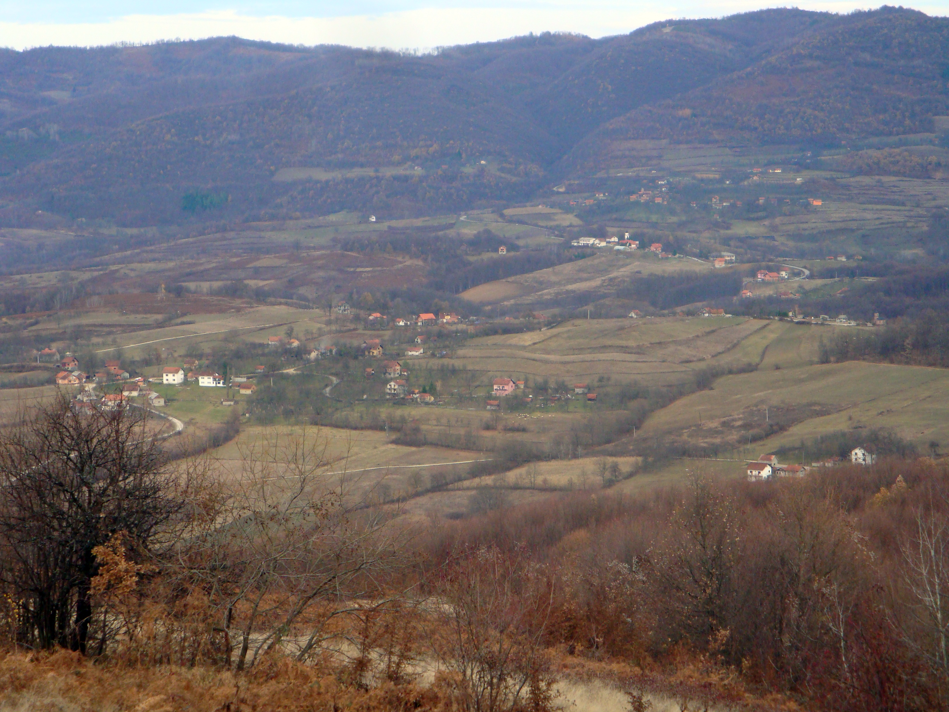 Поглед на Поповац (Челинац)